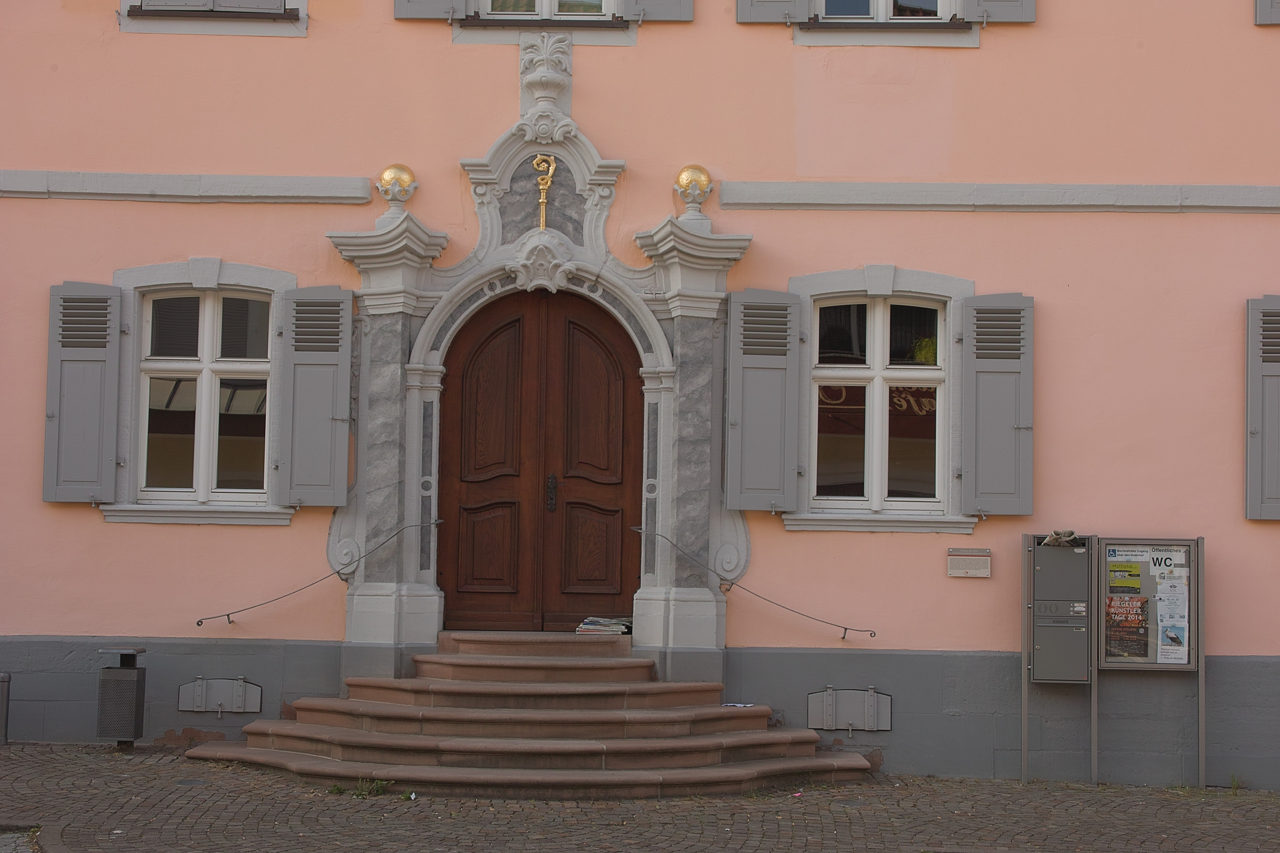 Abtshaus in Riegel. s.a. Infotafel.